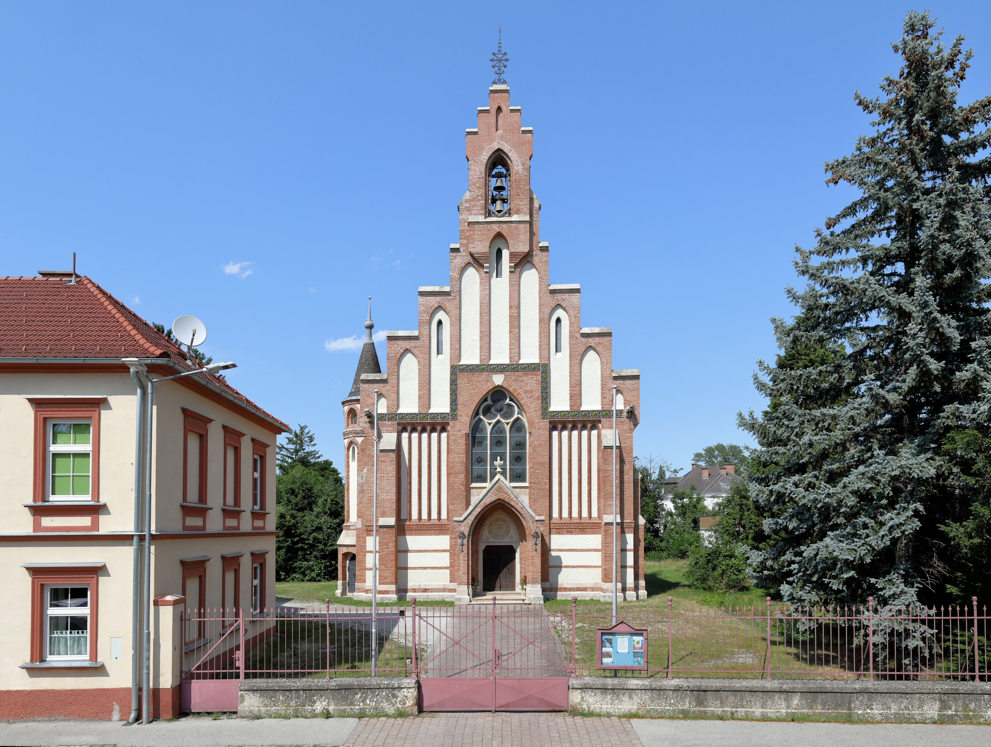 Südwestansicht der evangelischen Pfarrkirche in der niederösterreichischen Stadtgemeinde Neunkirchen. Der Backsteinbau im neugotischen Stil wurde 1862/63 nach Plänen des Wiener Architekten Hans (Johann) Petschnig (* 1821) errichtet.